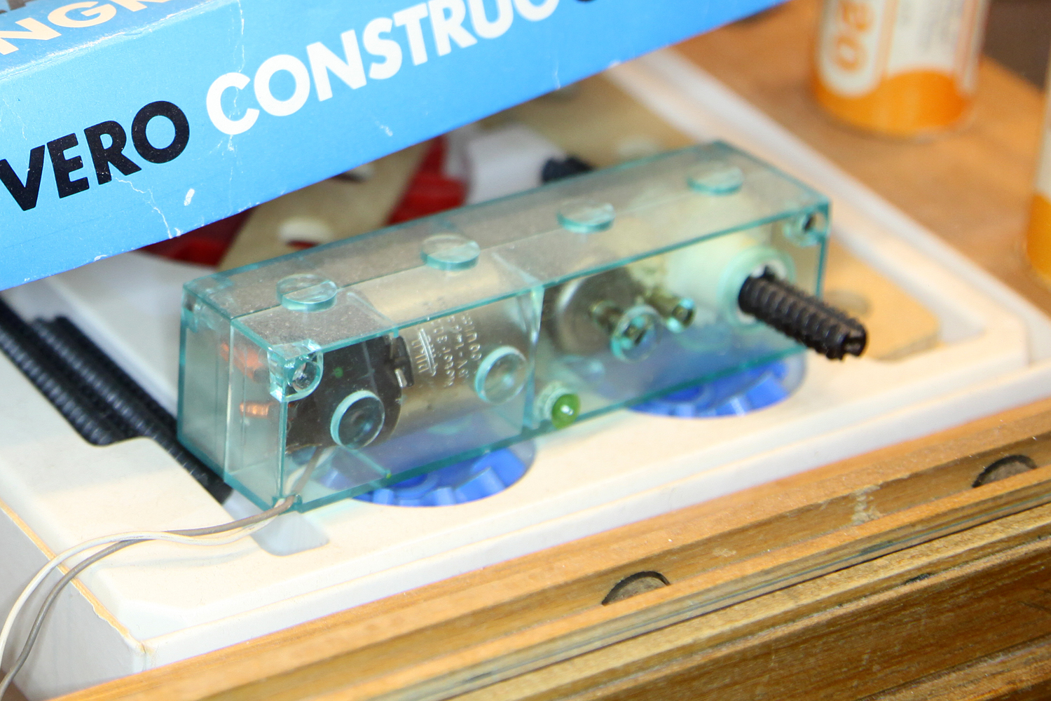 Vero Construc Baukasten: Baustein mit Elektromotor (Antriebsmotor von PIKO) im DDR-Museum Pirna